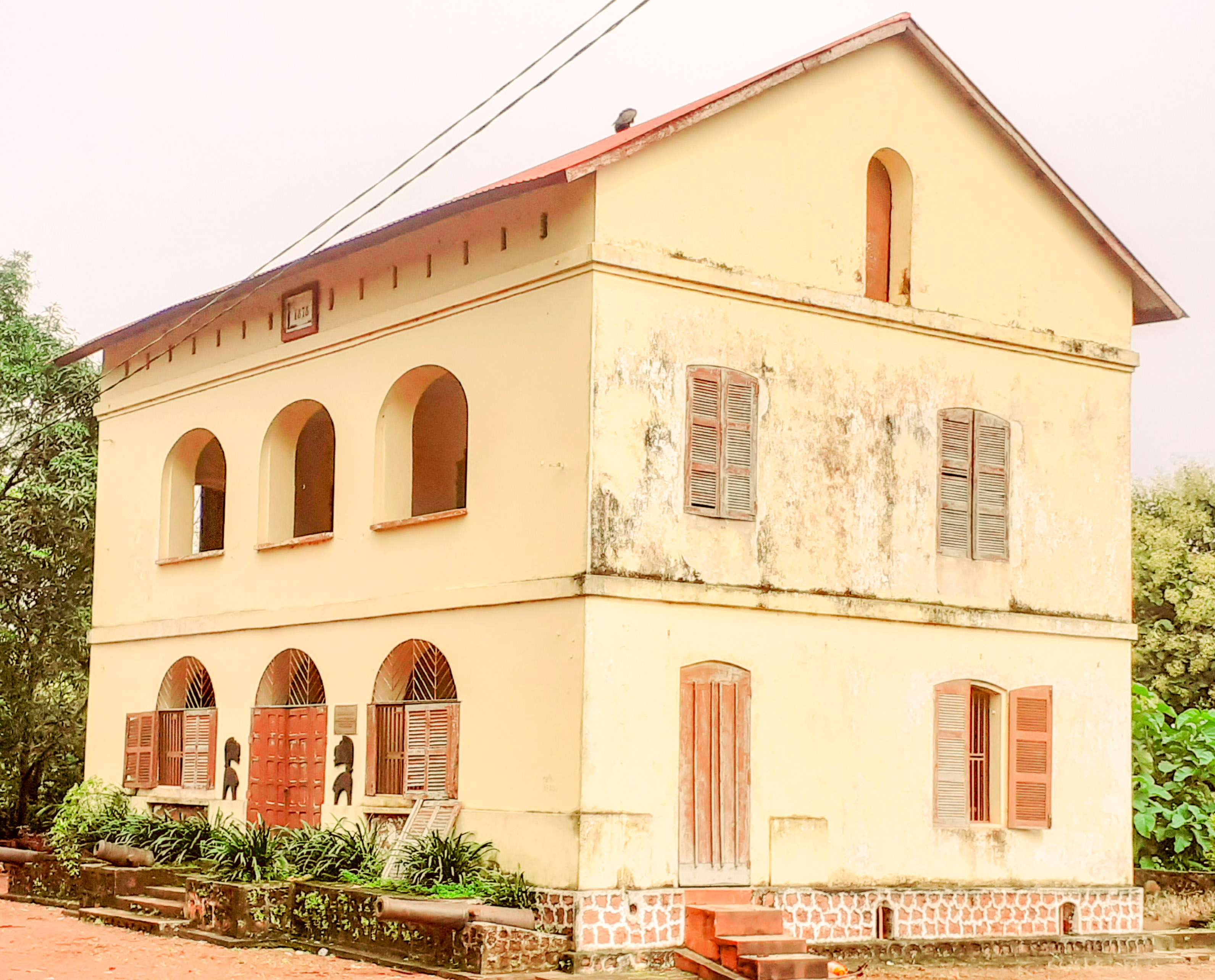 Vue du musée de BokéDepicted place: Musée de Boké